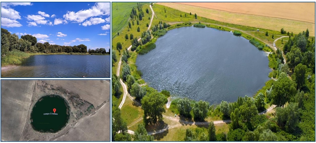 Озеро Стибін, розташоване біля села Савин